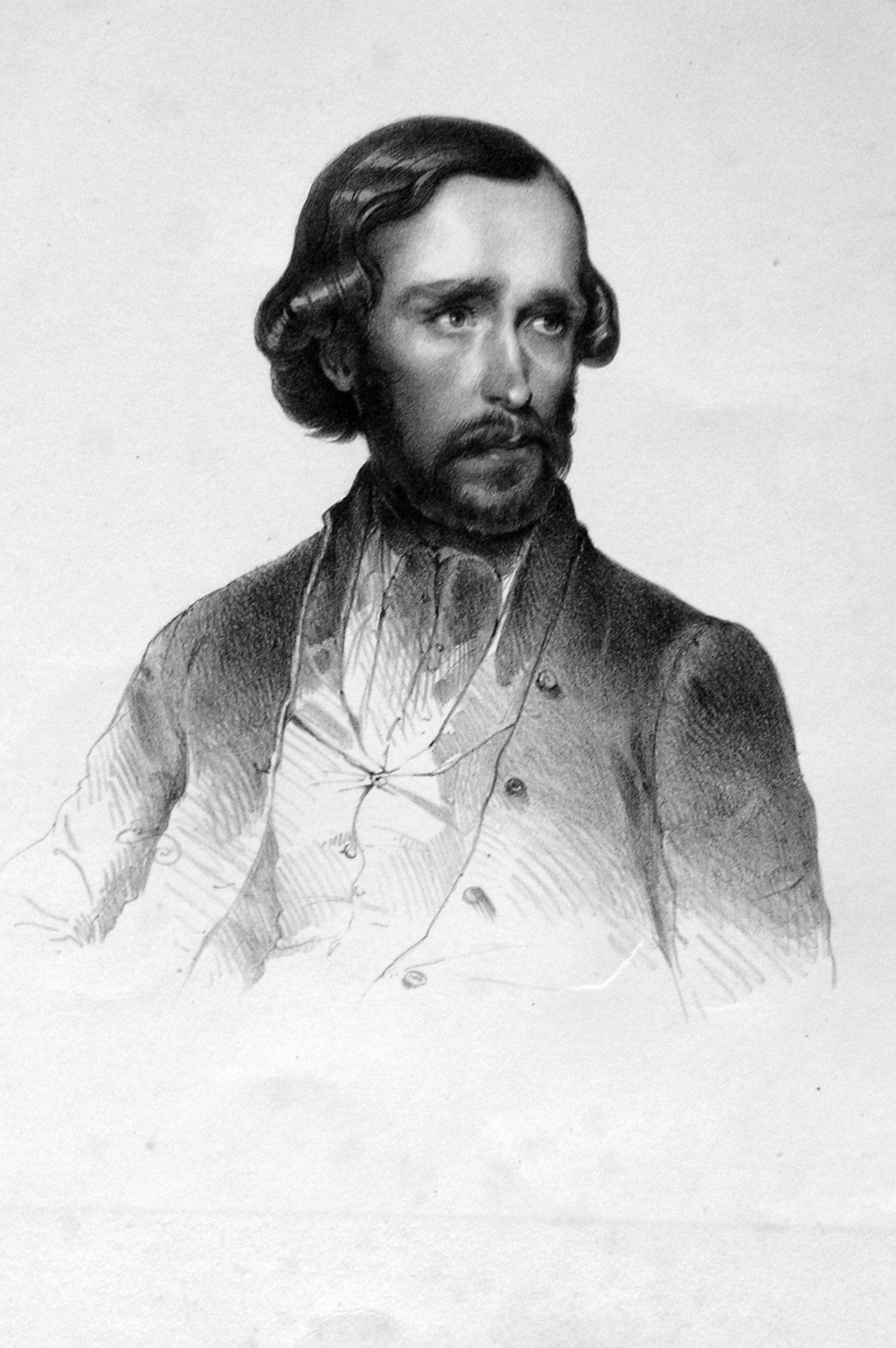 Johann Preleuthner, Lithographie von Eduard Swoboda